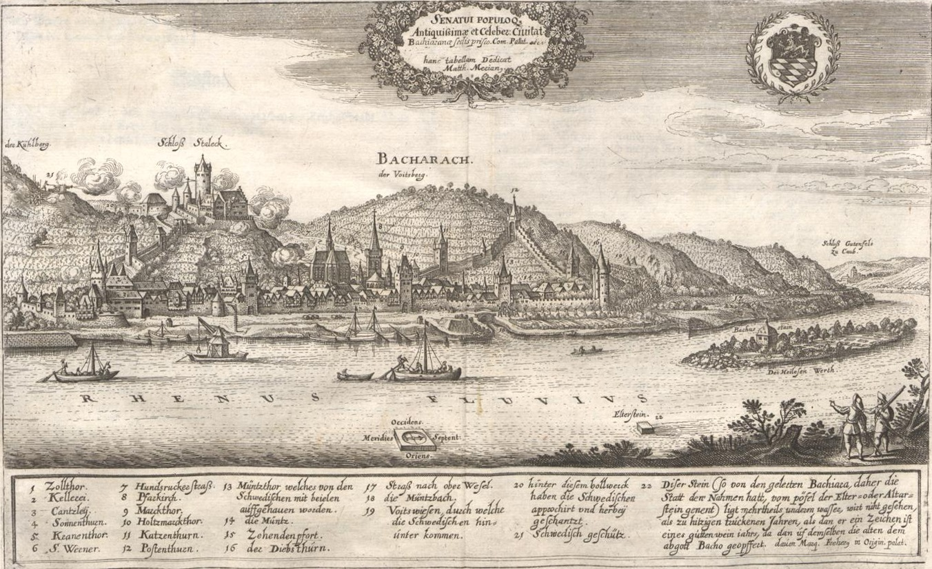 Bacharach